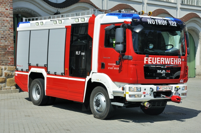 Hilfeleistunglöschfahrzeug der Berufsfeuerwehr Wien; hier abgelichtet vor der Hauptfeuerwache Mariahilf